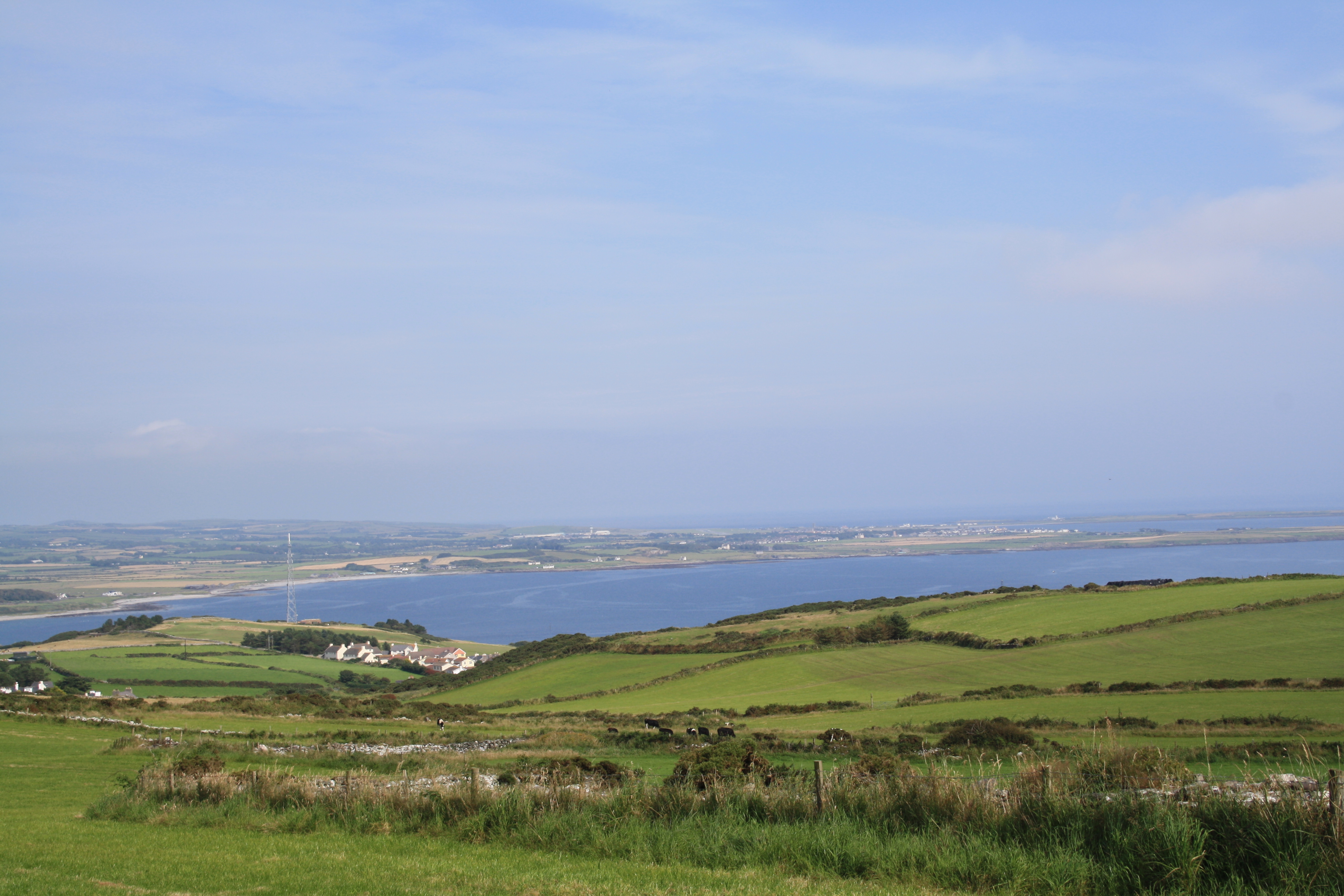 Cregneash, piccolo scorcio dall'alto.